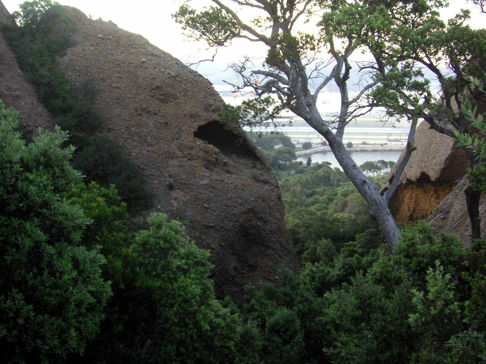 Photo prise depuis le milieu de pic de l'aigle, avec au fond le chantier naval de La Ciotat (13), France.